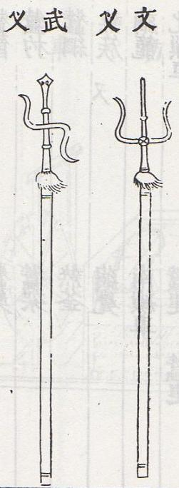 文叉與武叉的繪圖。